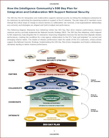 500 day plan